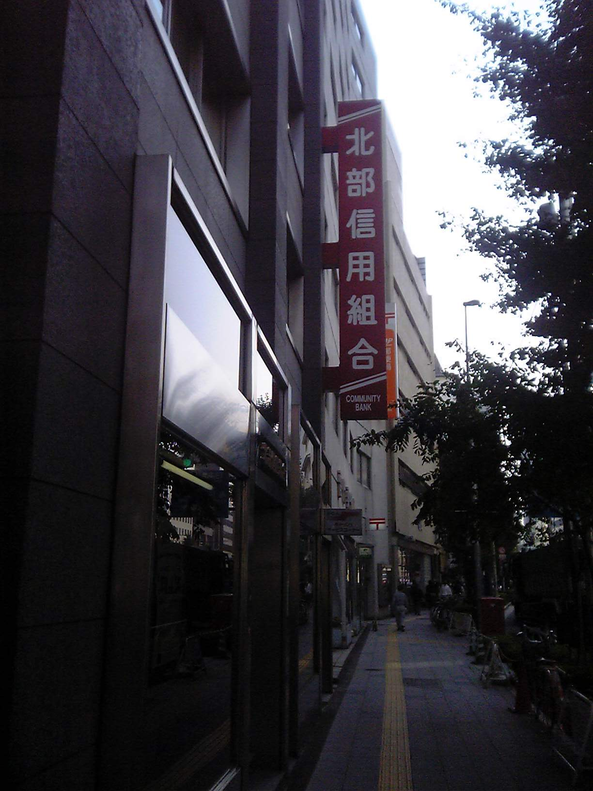 北部信用組合本部(2009/10/31撮影)